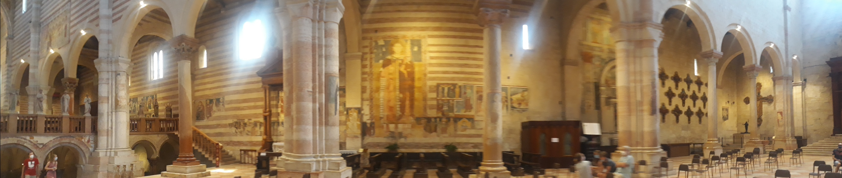 Basilica di San Zeno a Verona (interno)